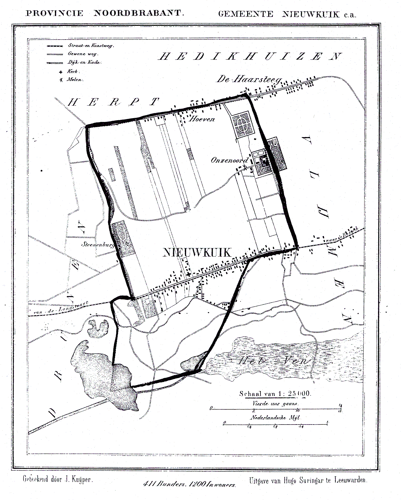 Nederland, Noord-Brabant, Gemeente Nieuwkuik